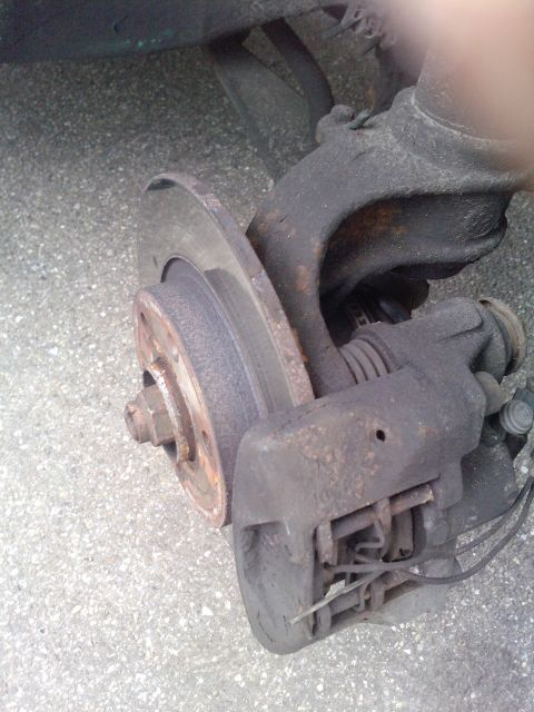 Bremssattel Peugeot 106, ATE